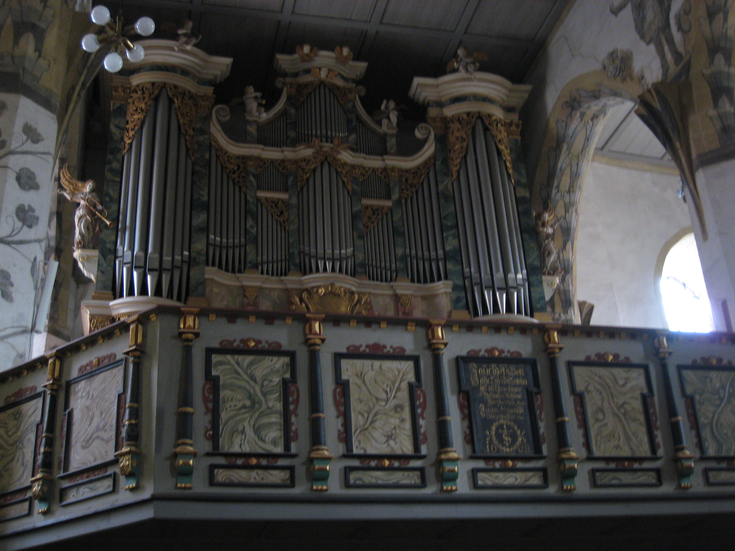 Orgel in der Jakobikirche in Sangerhausen